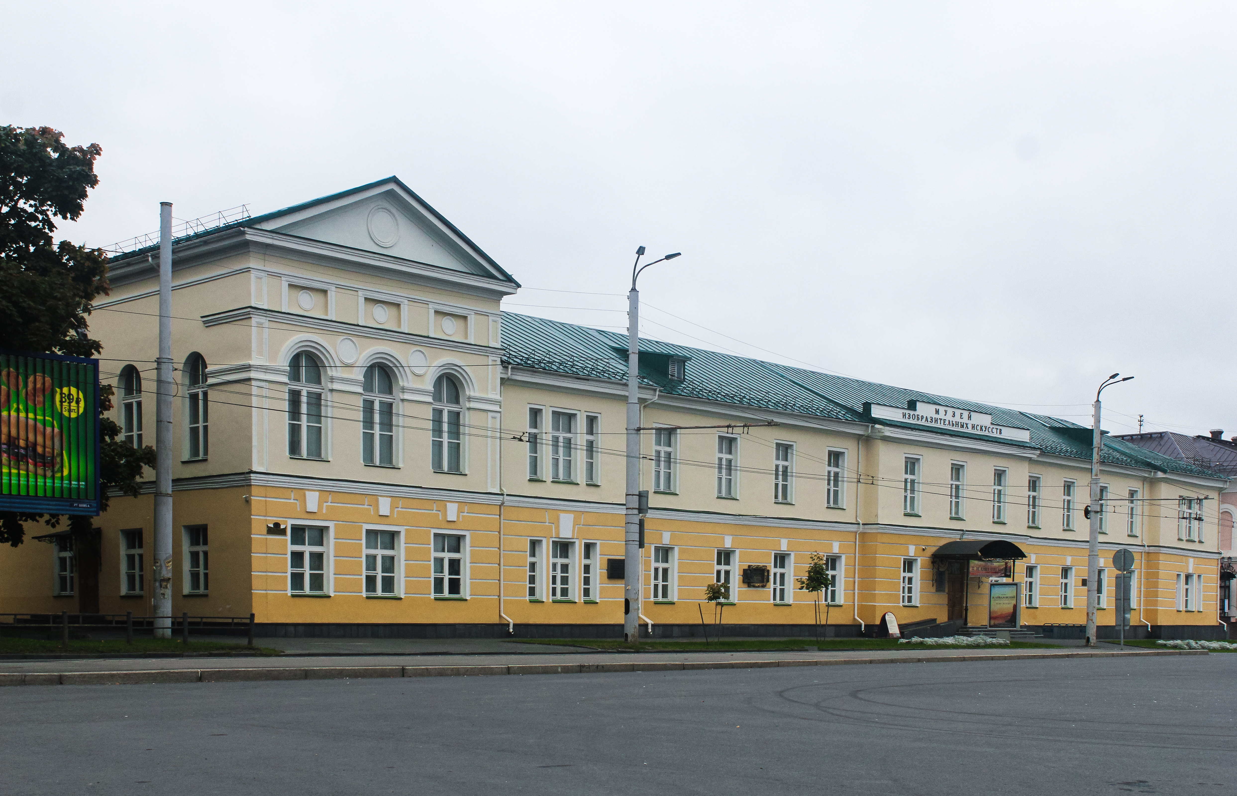 Здание гимназии, в которой учились художник Поленов В.Д. и языковед Фортунатов Ф.Ф.: проспект Карла Маркса, 8, Петрозаводск, Карелия